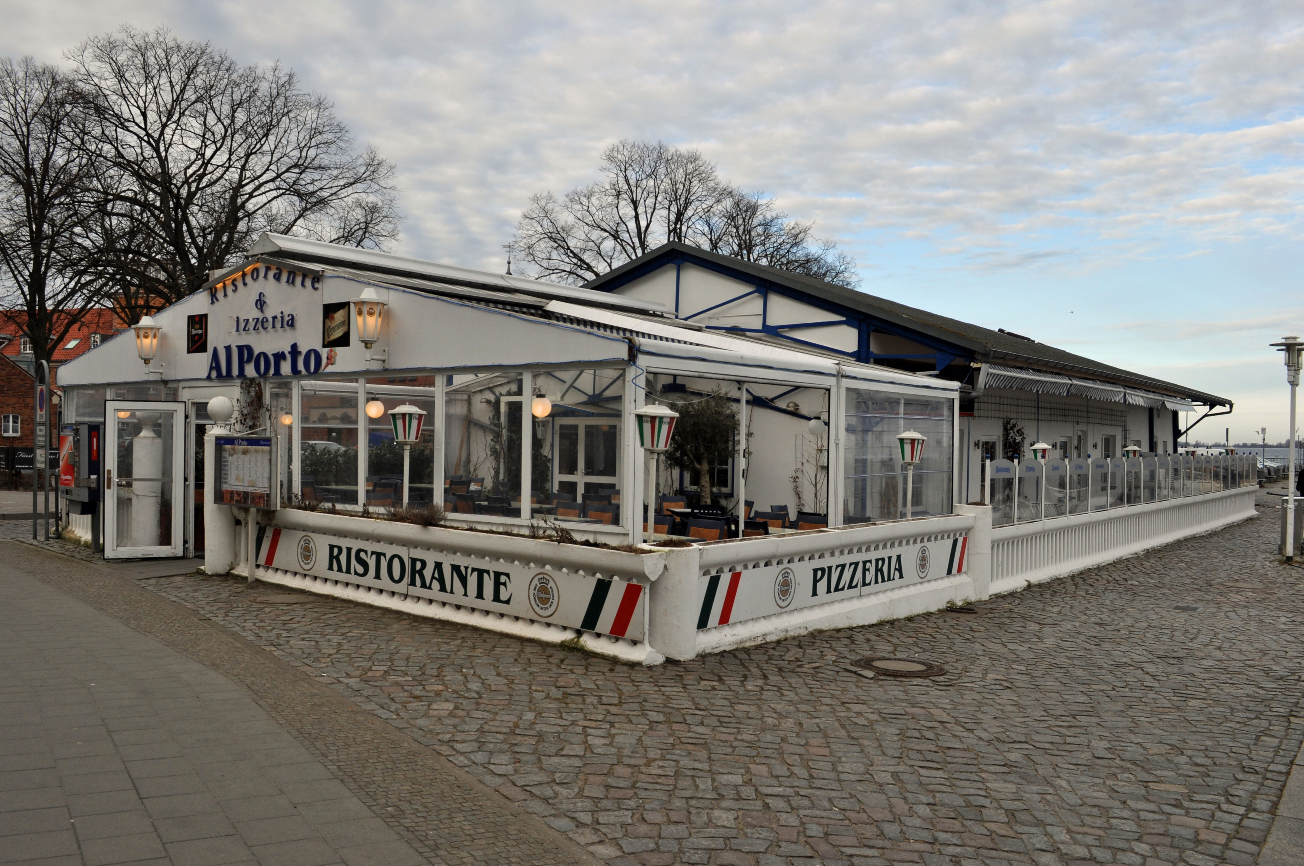 Gebäude bzw. Gebäudedetail in Stralsund. Straße und Hausnummer siehe Dateiname.